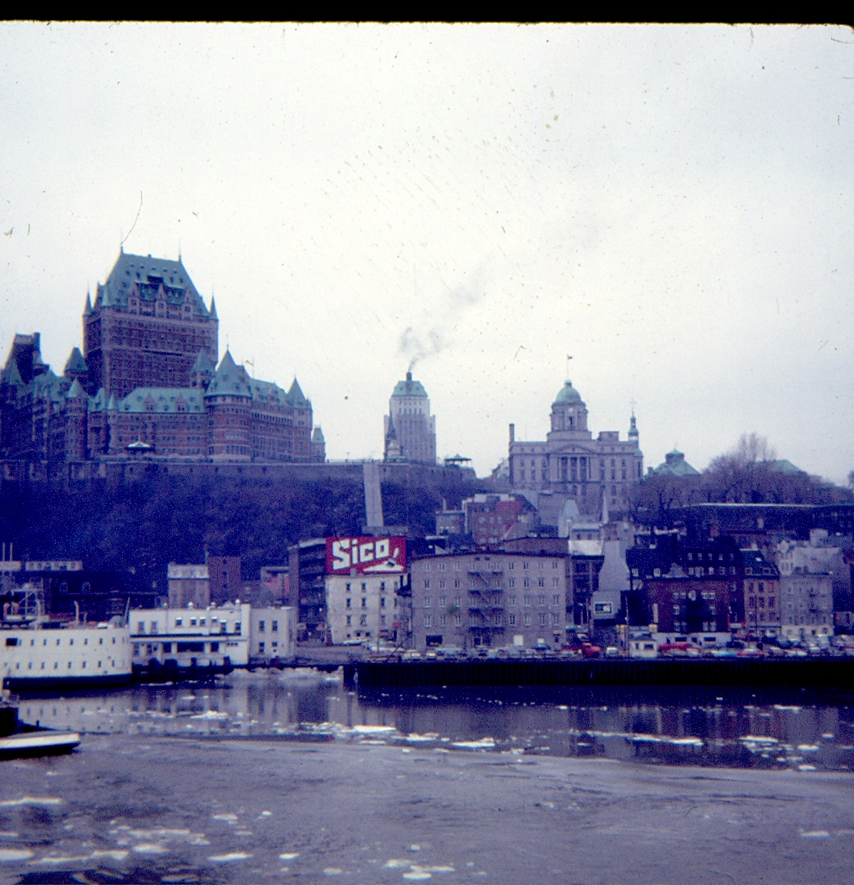 Frontenac 5 mars 1964 c